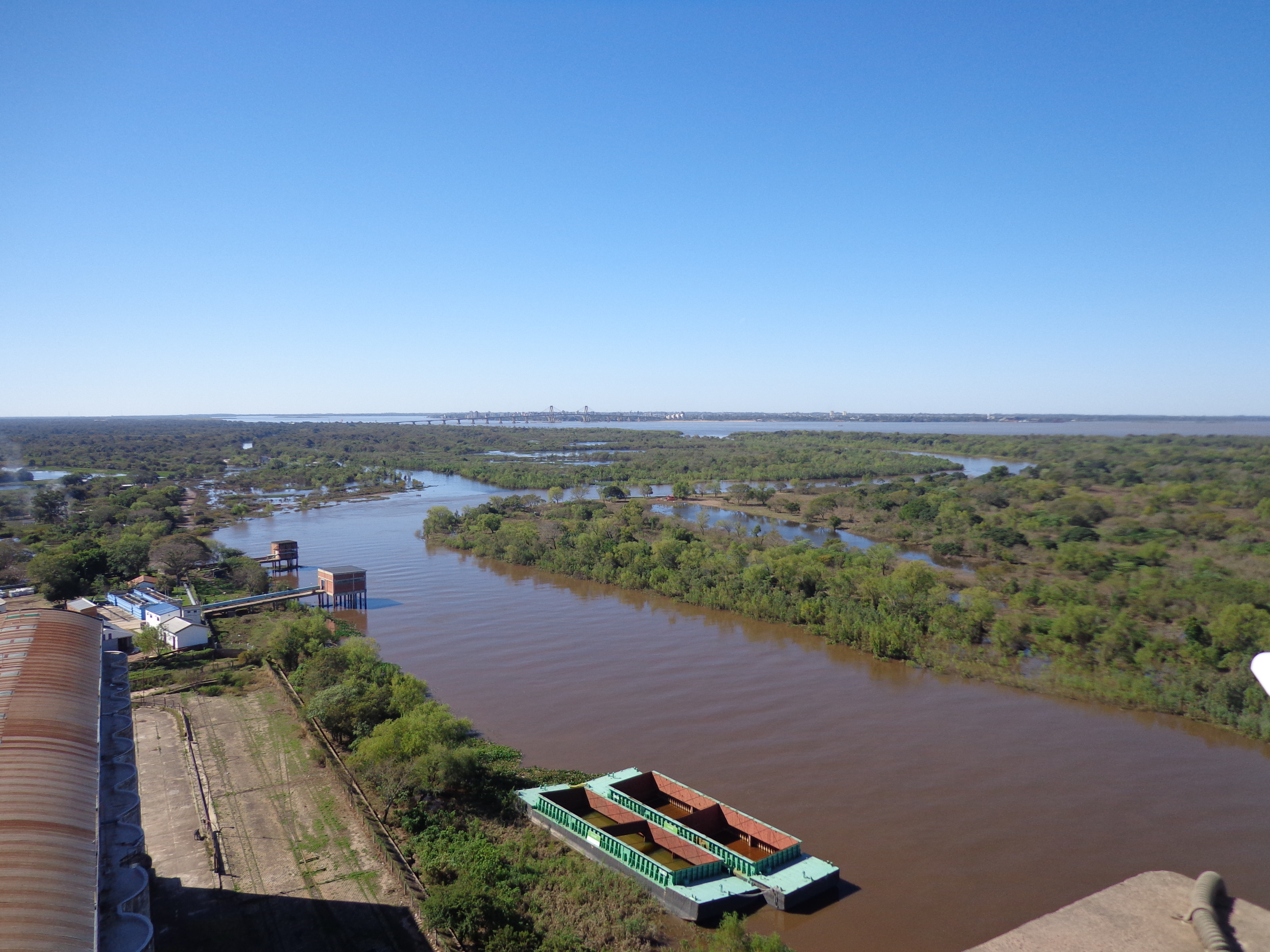 Tramo superior del Riacho Barranqueras, se observan la desembocadura del río Negro y la curva de ingreso.